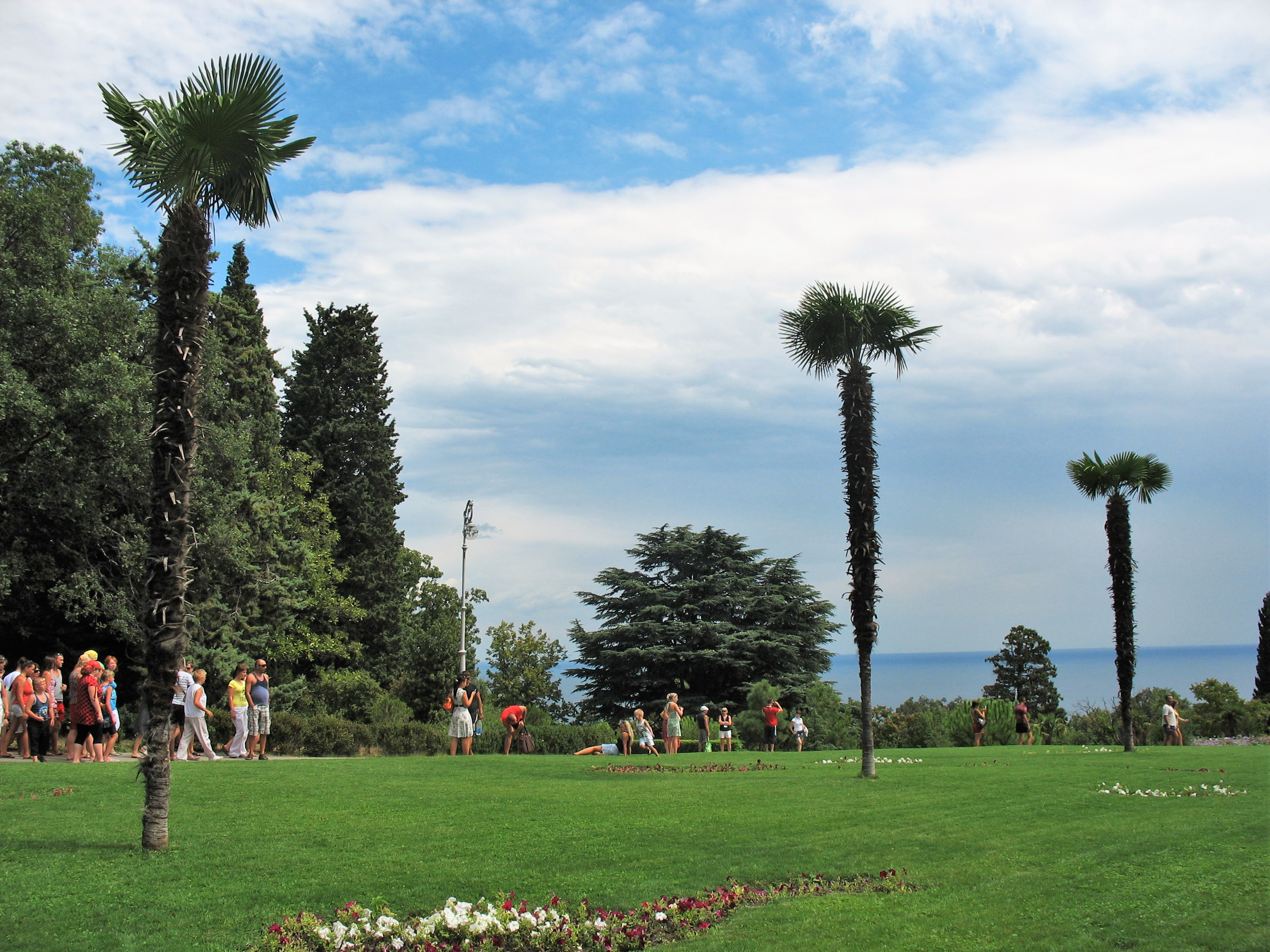 У Ливадийского дворца